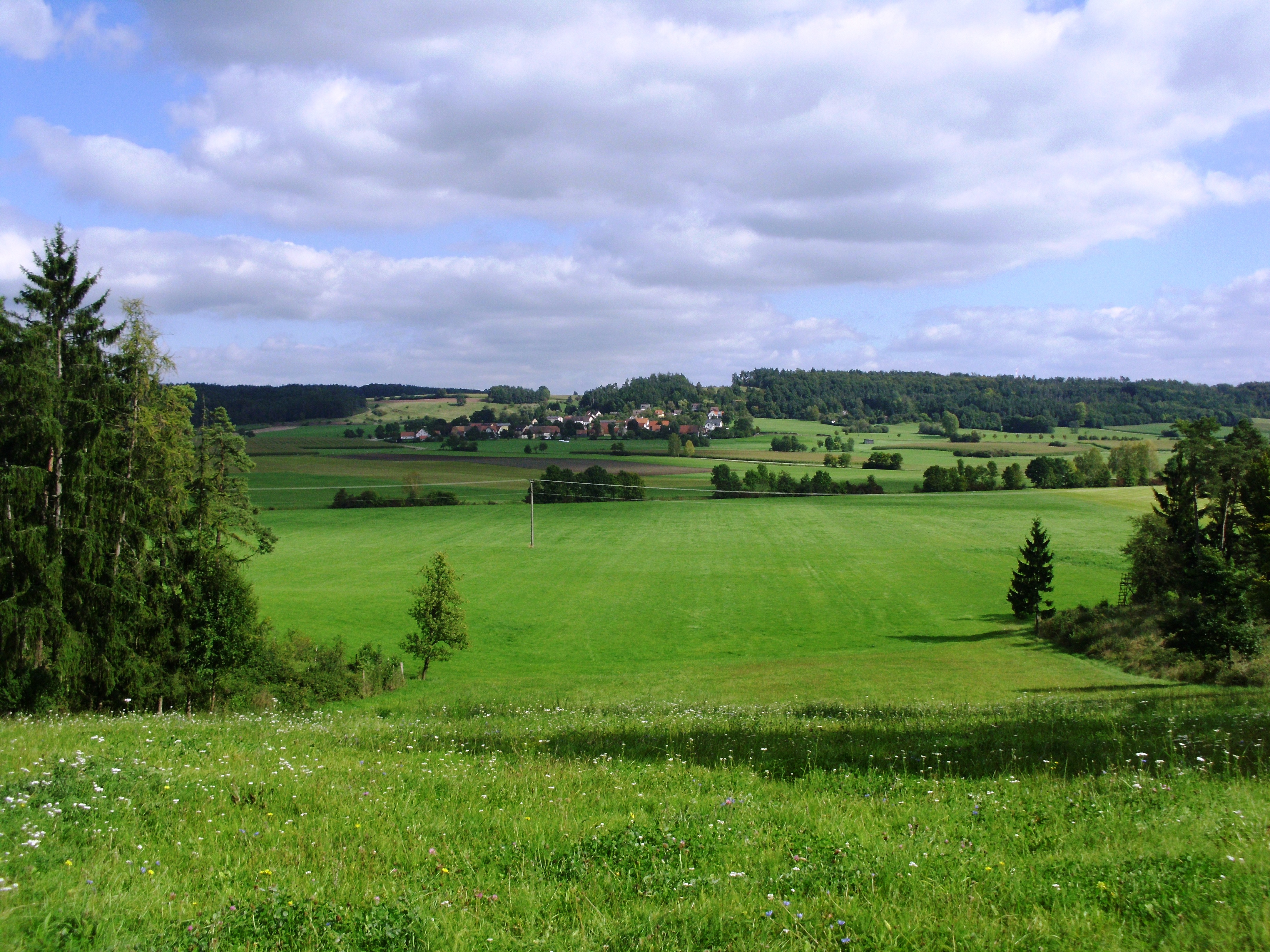 Oberramstadt, Ortsteil der mittelfränkischen Stadt Leutershausen